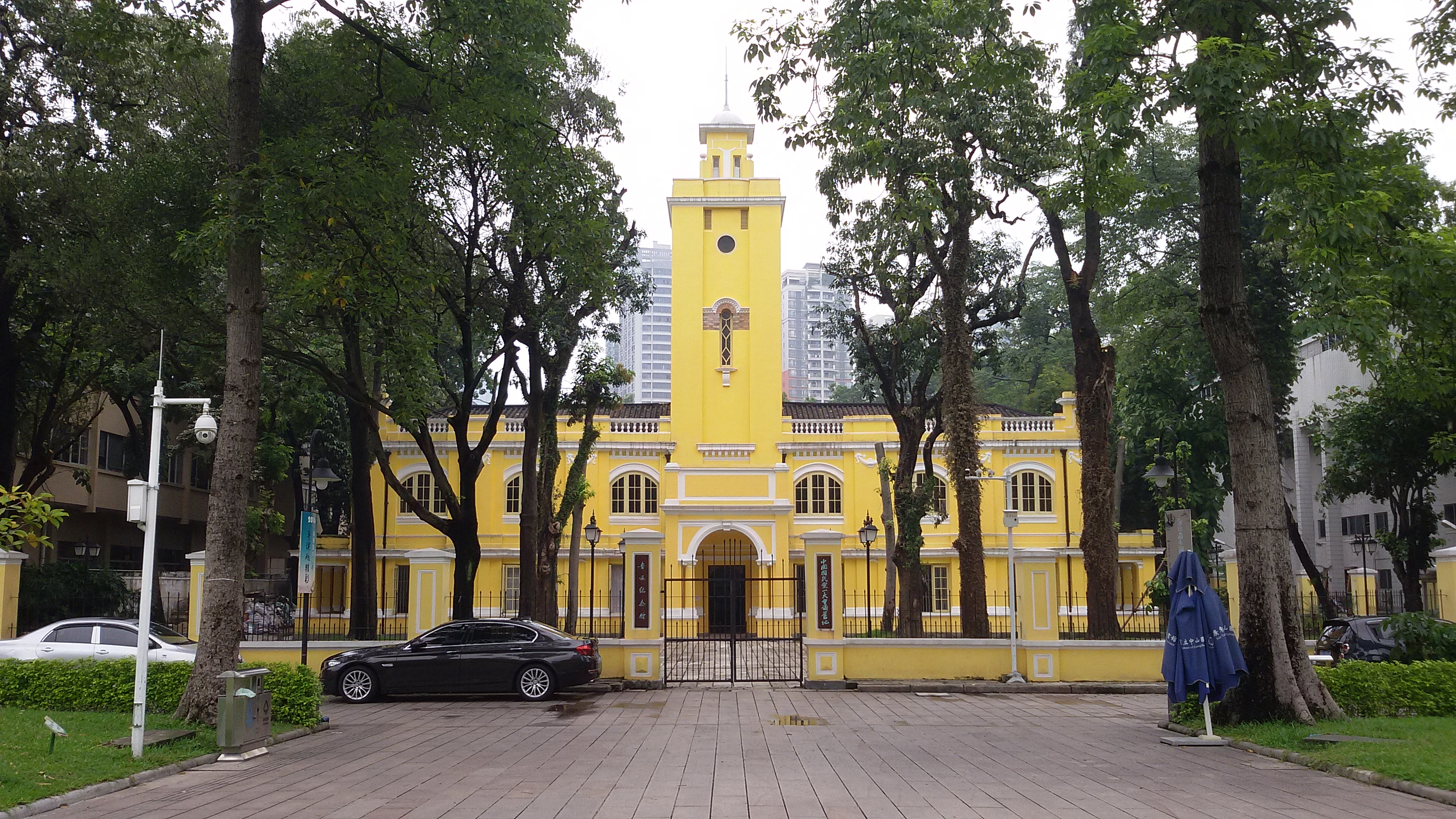 粵語: 廣州魯迅紀念館